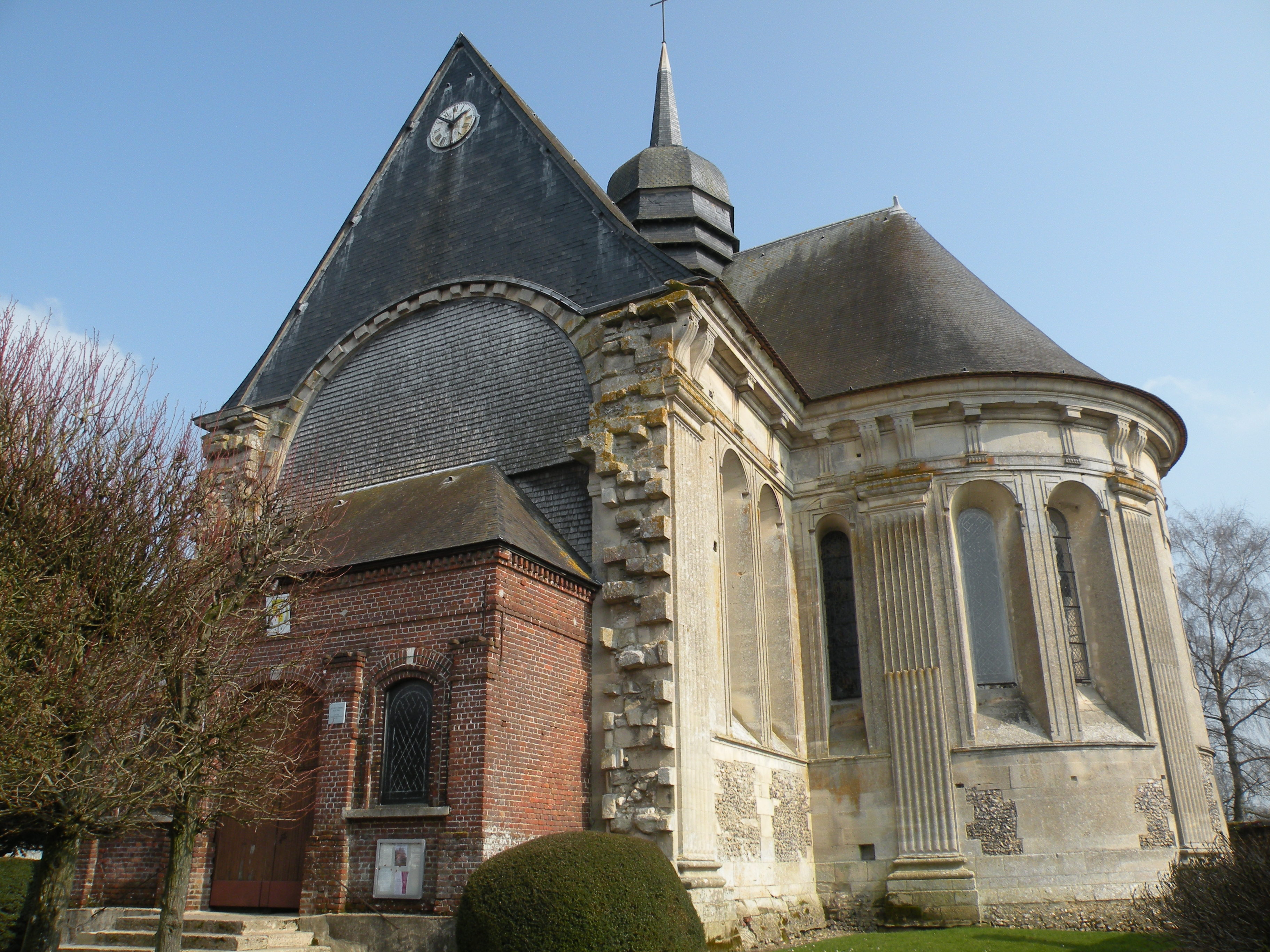 exterieur de l'Église Saint-Pierre et Saint-Paul de Jouy-sous-Thelle